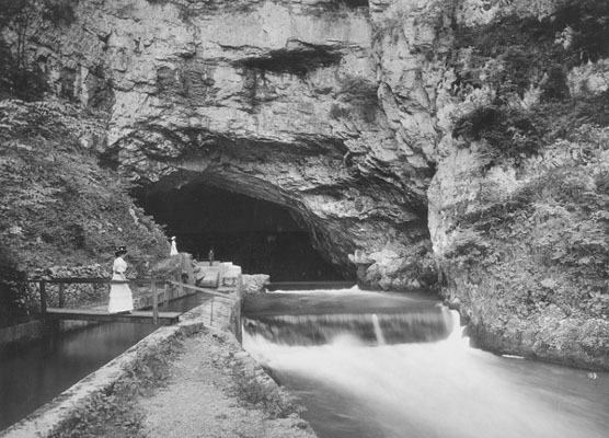 Malograjska jama (danes Planinska jama) pri Planini v okolici Postojne in izvir podzemne Pivke, združene z reko Rak, 1909.